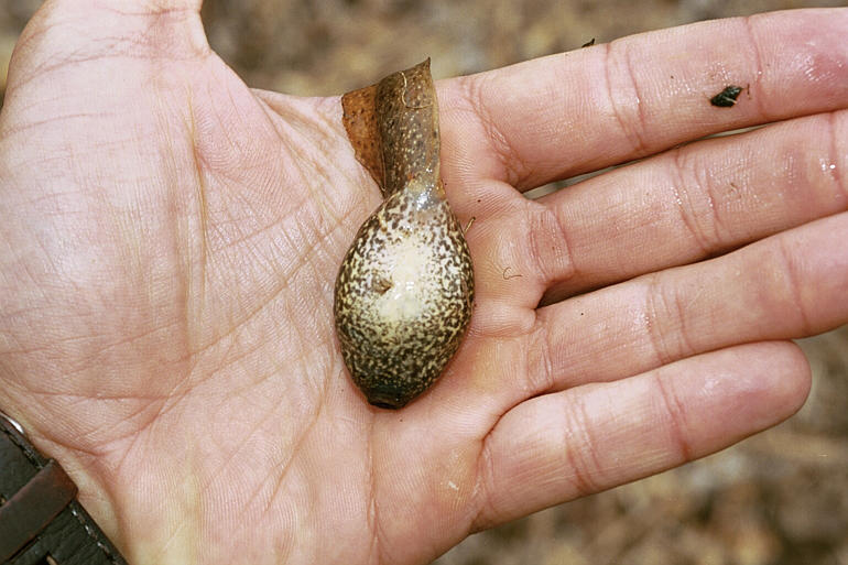 Rana catesbeiana